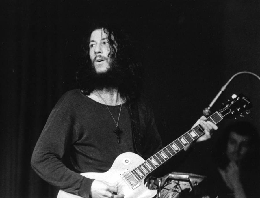 Peter Green, fundador y lider del Fleetwood Mac desde su formaciòn hasta 1970.